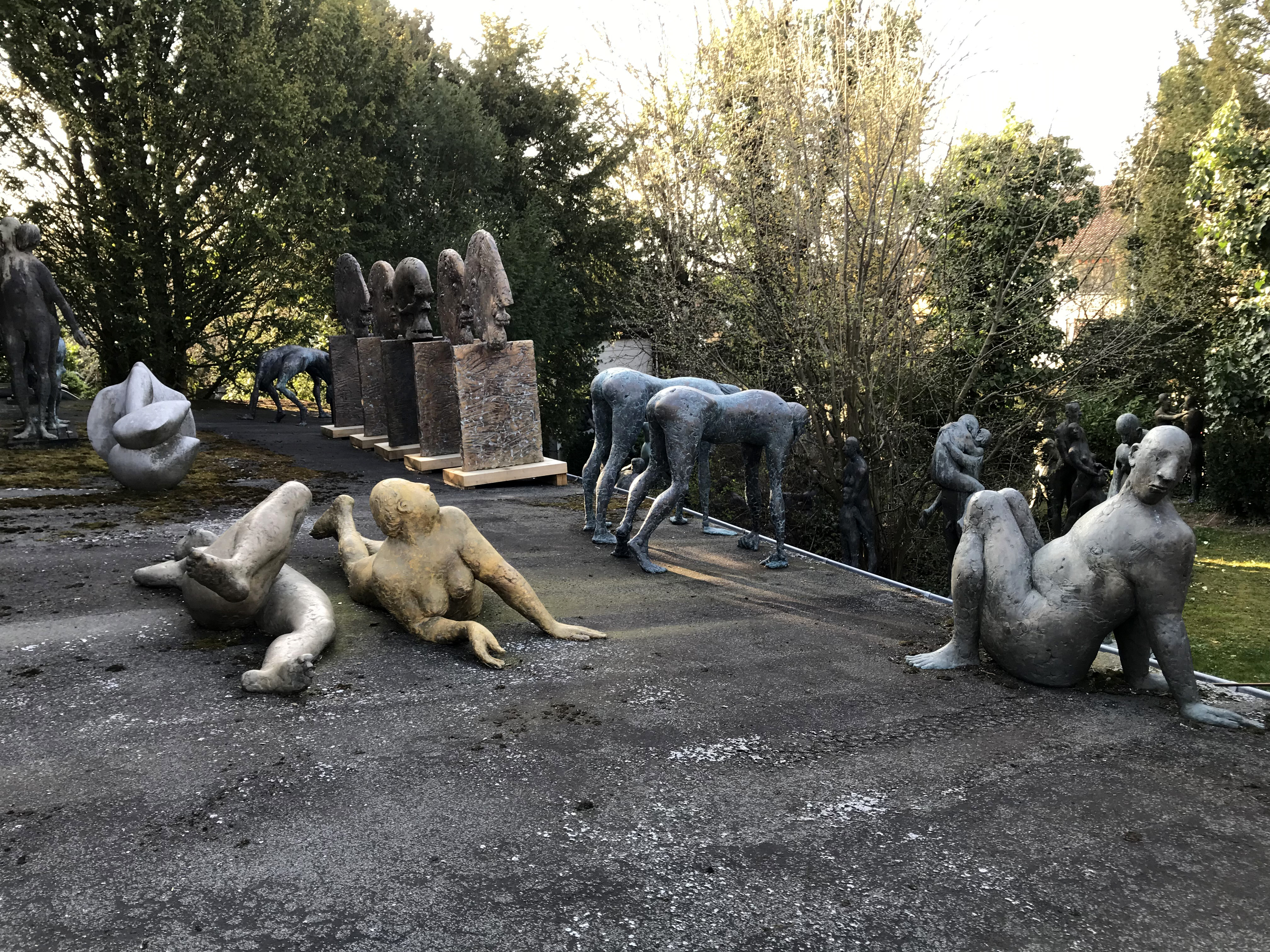 Fritz Nuss - Blick in sein Anwesen am Skulpturenpfad Strümpfelbach